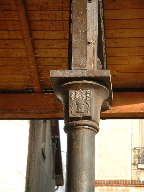 La halle aux fromages de Coulommiers, restaurée il y a peu. Auteur JP Montferrat